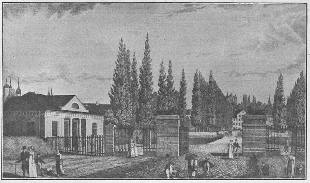 Das Steintor in Braunschweig am Anfang des 19. Jahrhunderts. Mit Löwen von Schadow (Heute nicht mehr vorhanden).